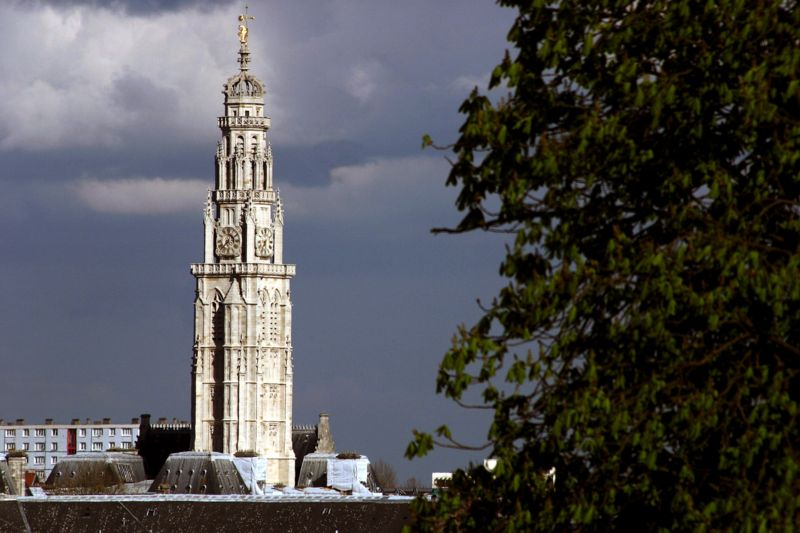 photo personnelle domaine public